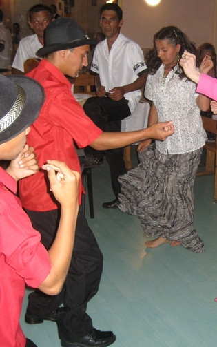 Young Hungarian Roma dancing.